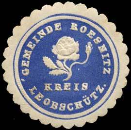 Sealing stamp Title: Gemeinde Roesnitz Kreis Leobschütz Description: blau, weiß, geprägt Place: Rösnitz size: 4 cm